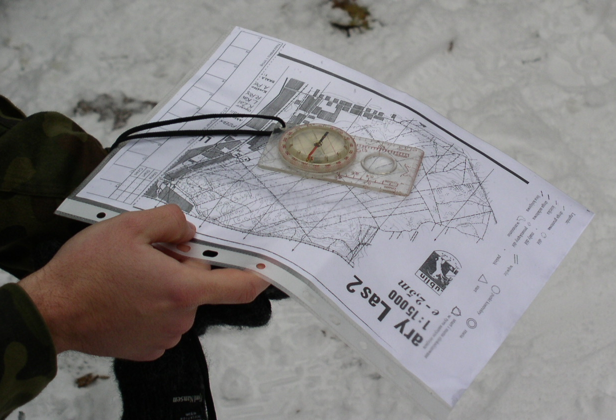 drawed orienteering map